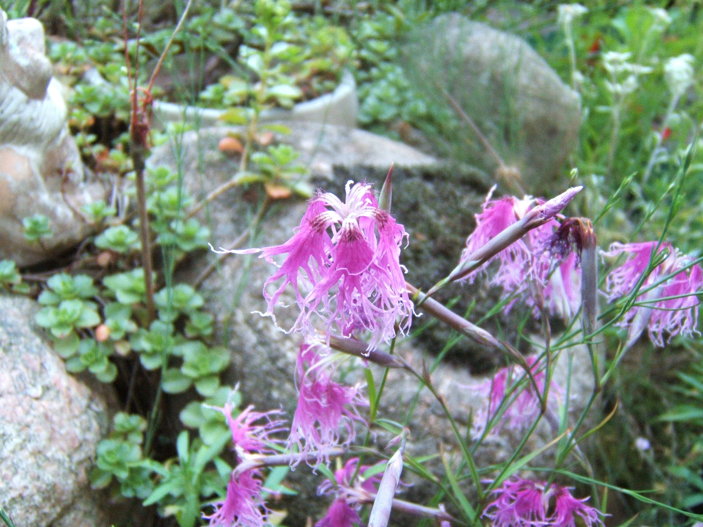 Categorie:Afbeelding plant